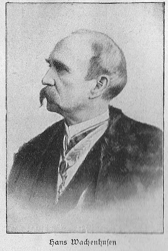 Jahrbuch der Berliner Morgenzeitung, Kalender 1899, S. 286 Scan --Goerdten 10:09, 15. Jan. 2007 (CET)